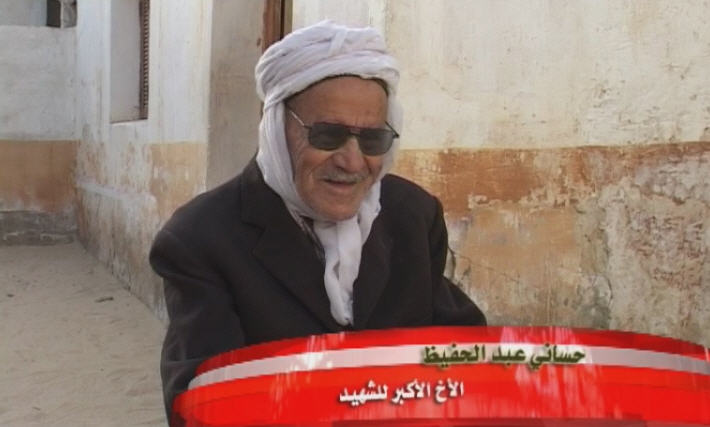 حساني عبد الكريم